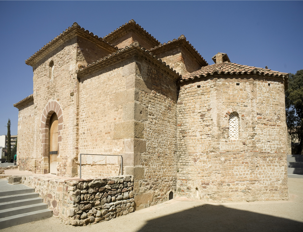 Cultural Heritage Spain